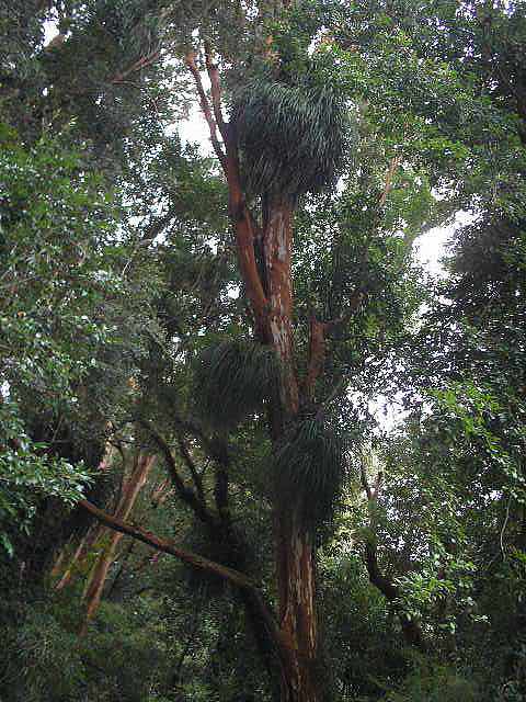 Arrayán (Luma apiculata) con poe. Los poes (Fascicularia bicolor) viven sobre los árboles, pero no se alimentan de ellos.